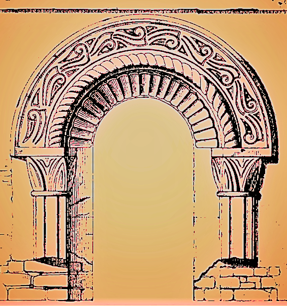 Oratoire carolingien de Germigny-des-Prés; Dessin de l'archivolte de la tour (image du domaine public modifiée)